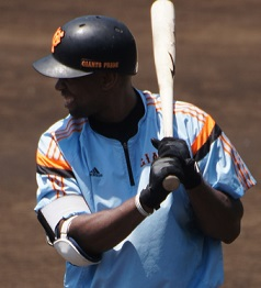 ジャイアンツアンダーソン選手